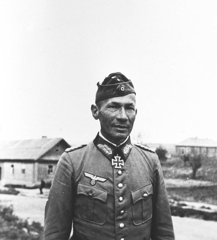 Maximilian (Max) Siry, Generalmajor, 246. I.D., Ritterkreuzträger (RK 18. Juni 1942)